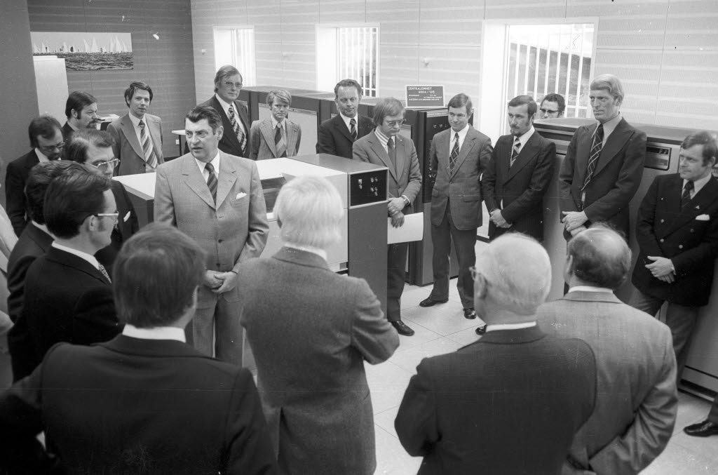 Der Computer übernimmt ab sofort die Kontoführung. Honoratioren der Sparkasse, der Siemens AG und der Stadt Kiel lassen sich die neue Rechenanlage erklären.